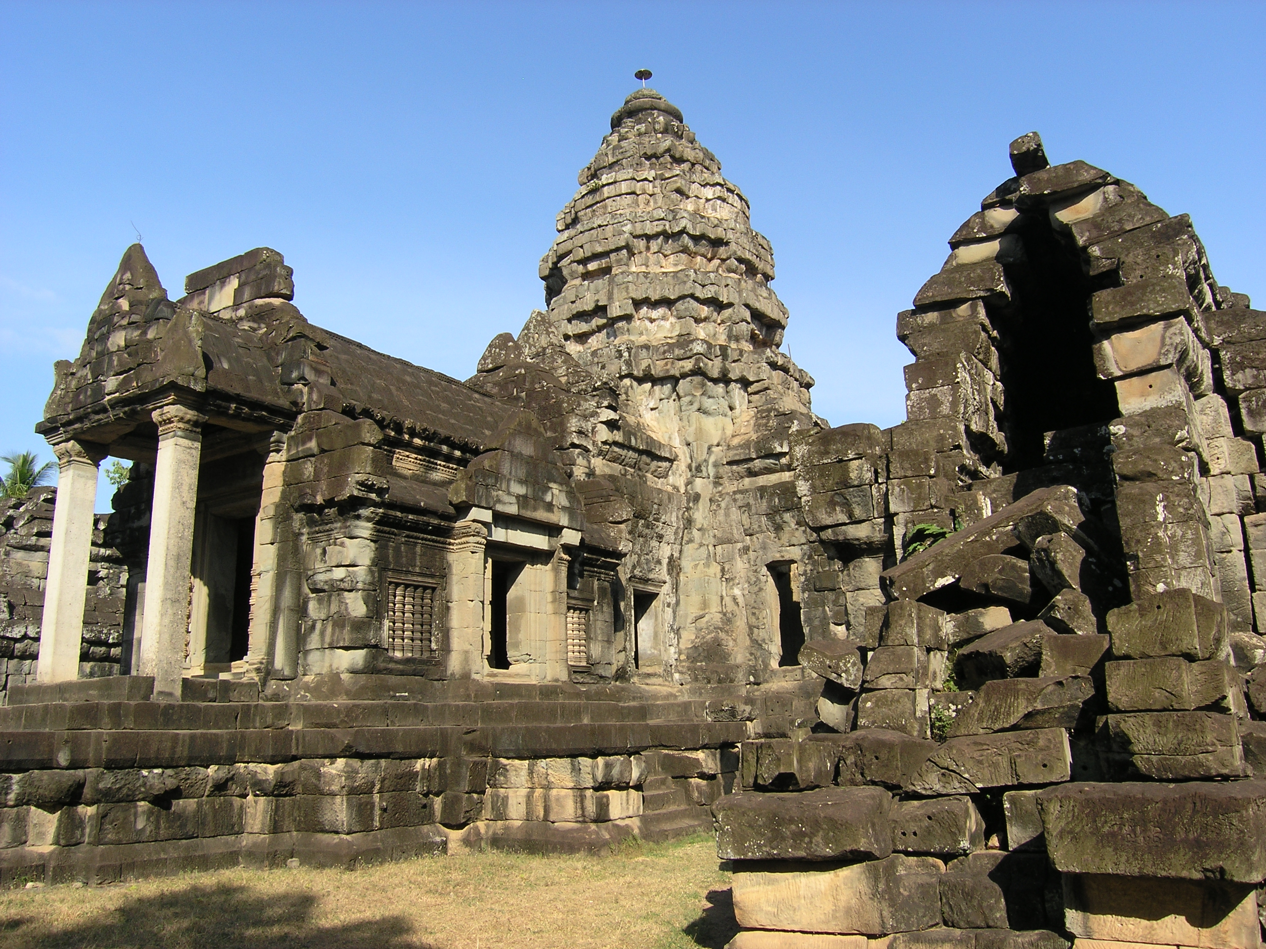 ワット・アトヴィアの中央祠堂。Central tower of Wat Athvea